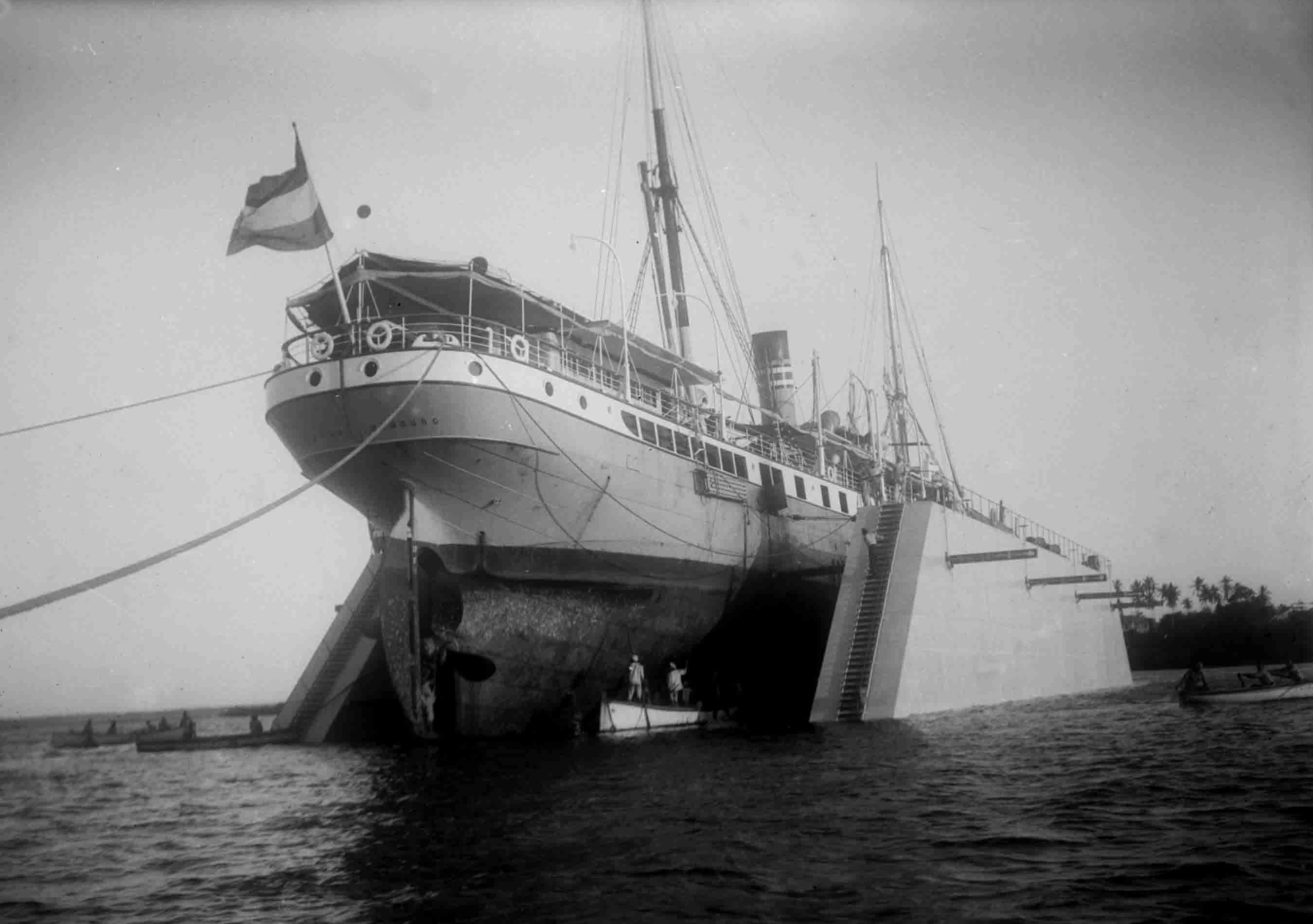 Das deutsche Schwimmdock in Daressalam mit dem gedockten Schiff Safari der Deutsche Ost-Afrika Linie.